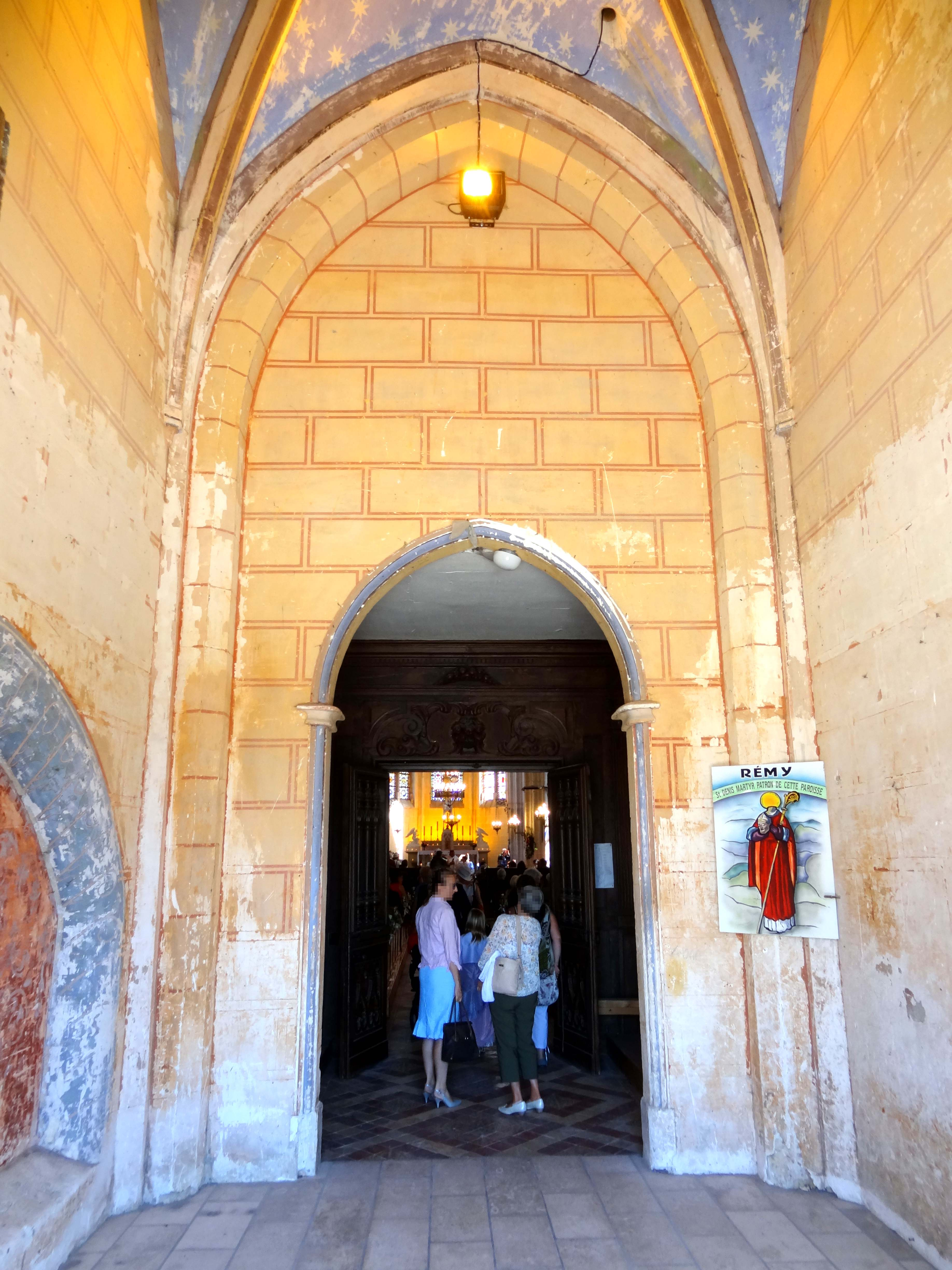 Intérieur de l'église - voir titre.